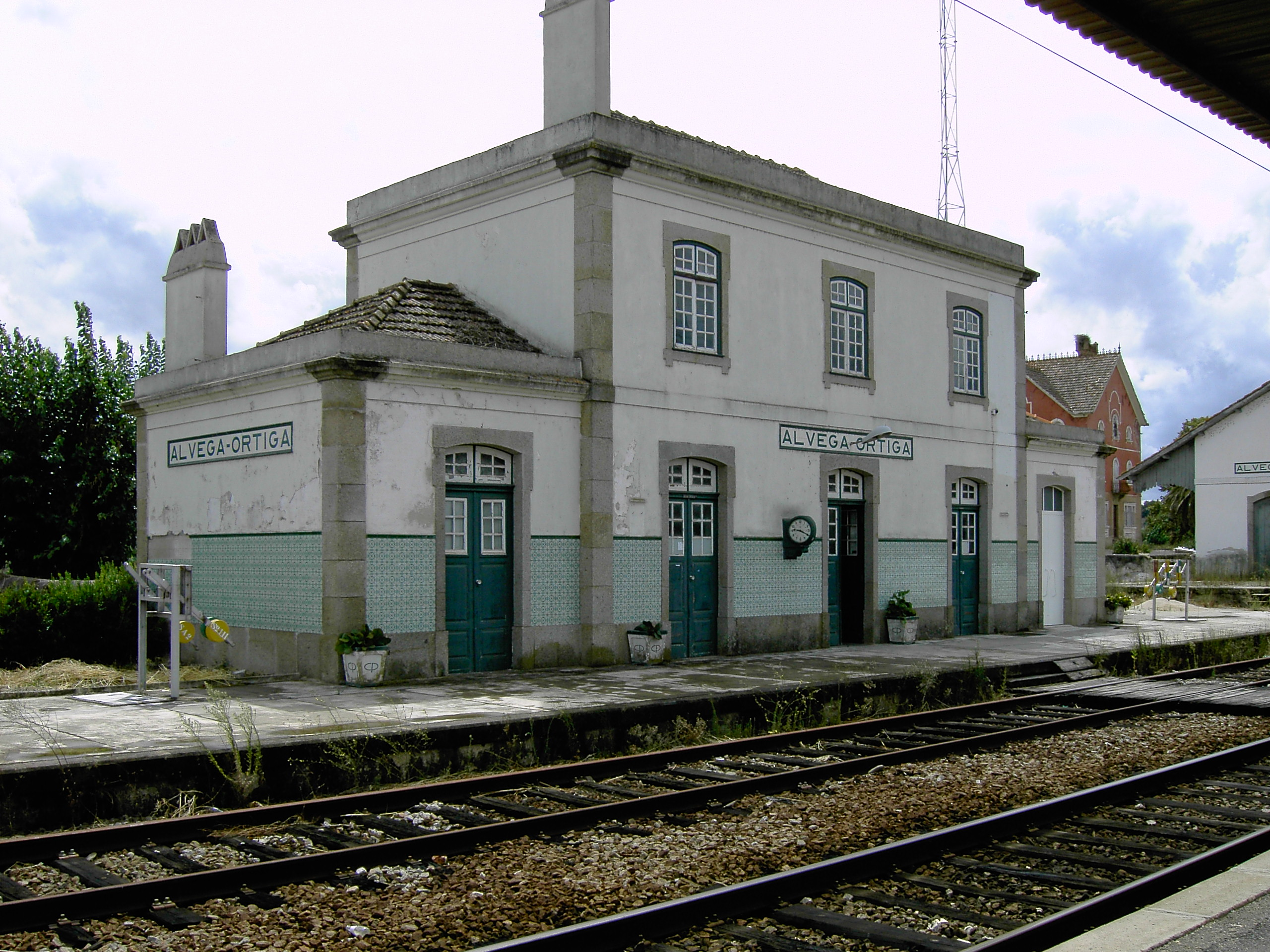 Estação Ferroviária de Alvega-Ortiga